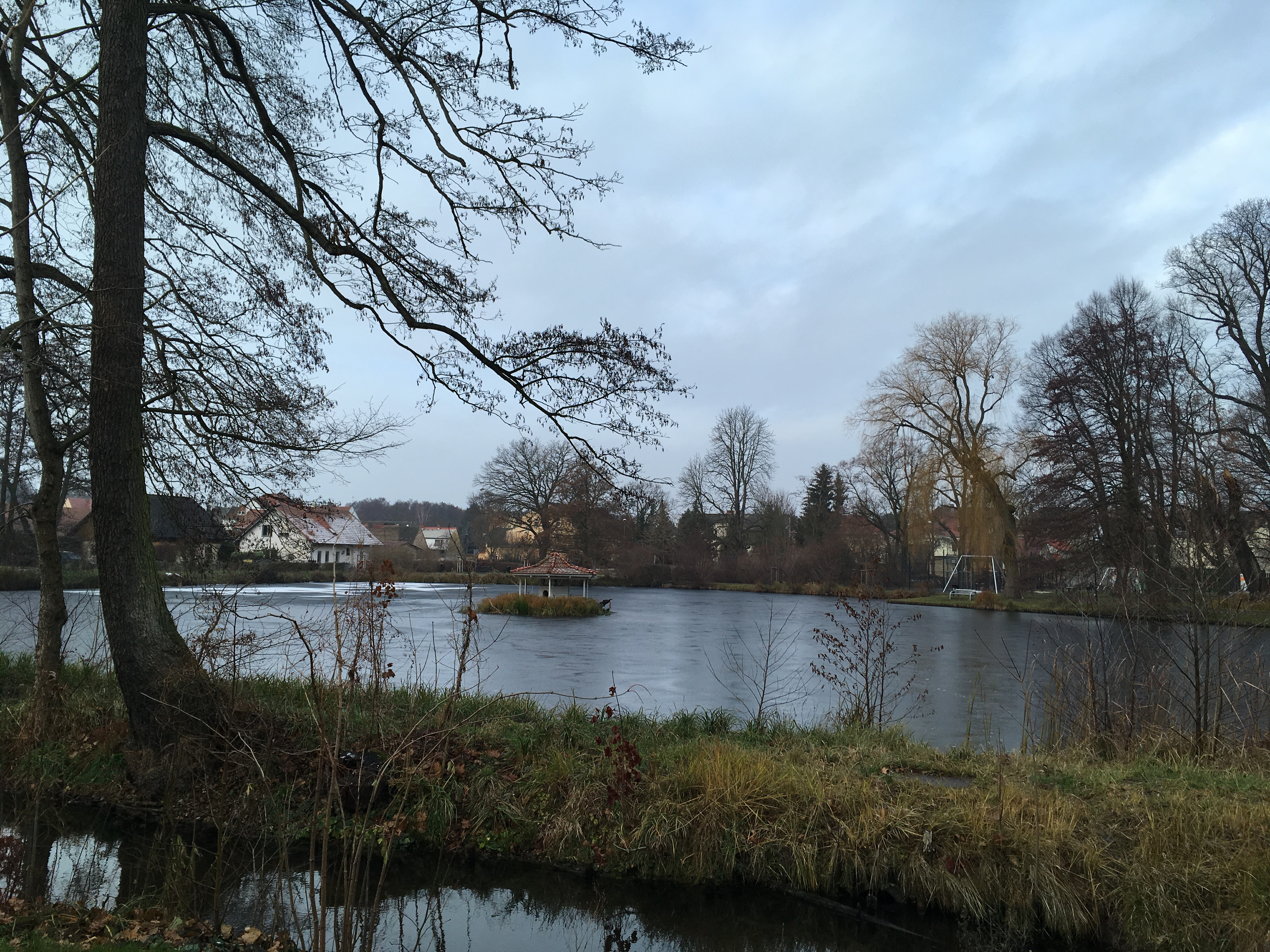 Der Stadtpark Treuenbrietzen ist eine denkmalgeschützte Grünanlage in Treuenbrietzen, Landkreis Potsdam-Mittelmark in Brandenburg. Er umfasst unter anderem einen Ehrenhain für Opfer aus dem Deutsch-Französischen-Krieg sowie aus den beiden Weltkriegen.